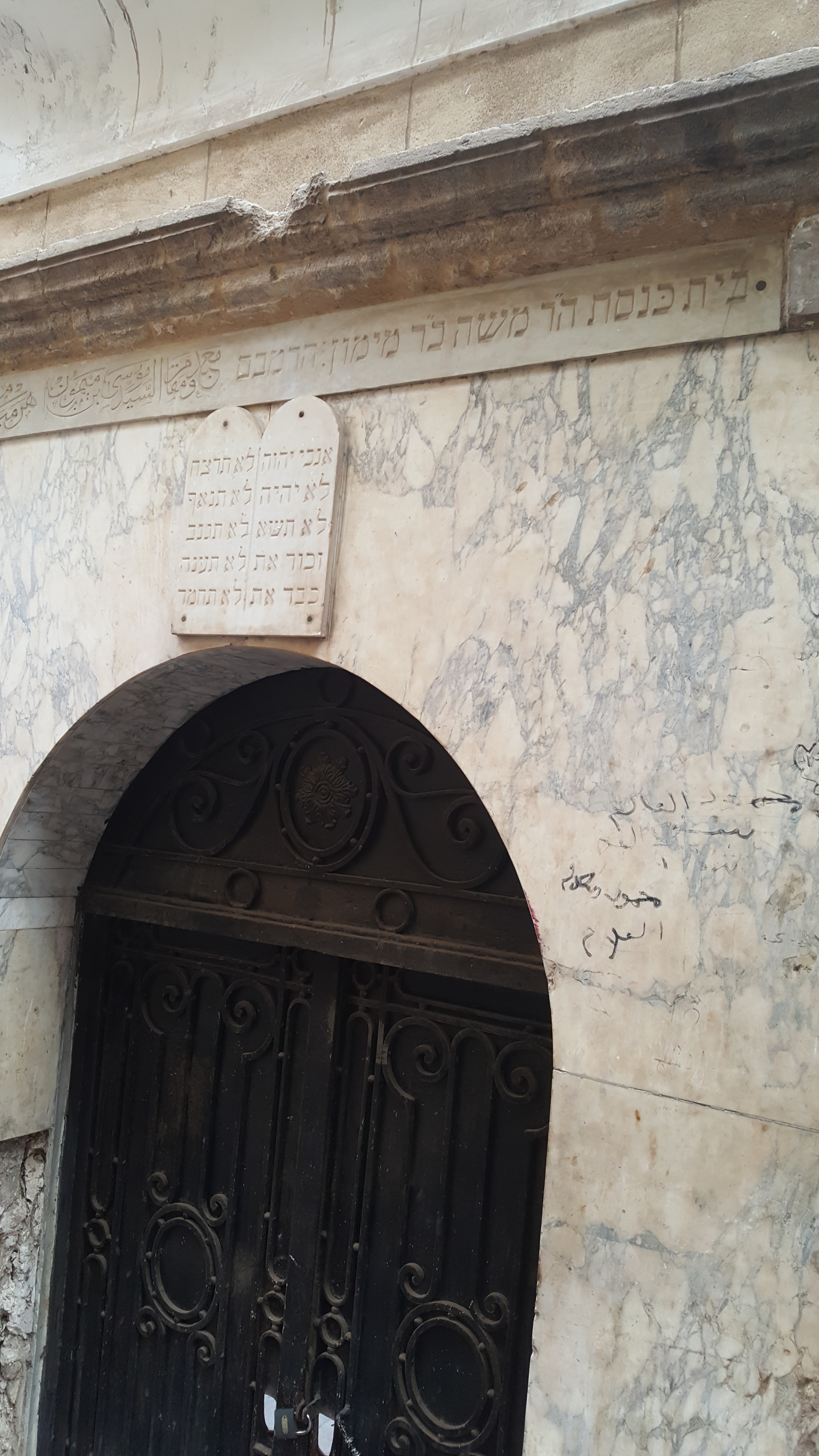 Synagogue of Moses Maimonides